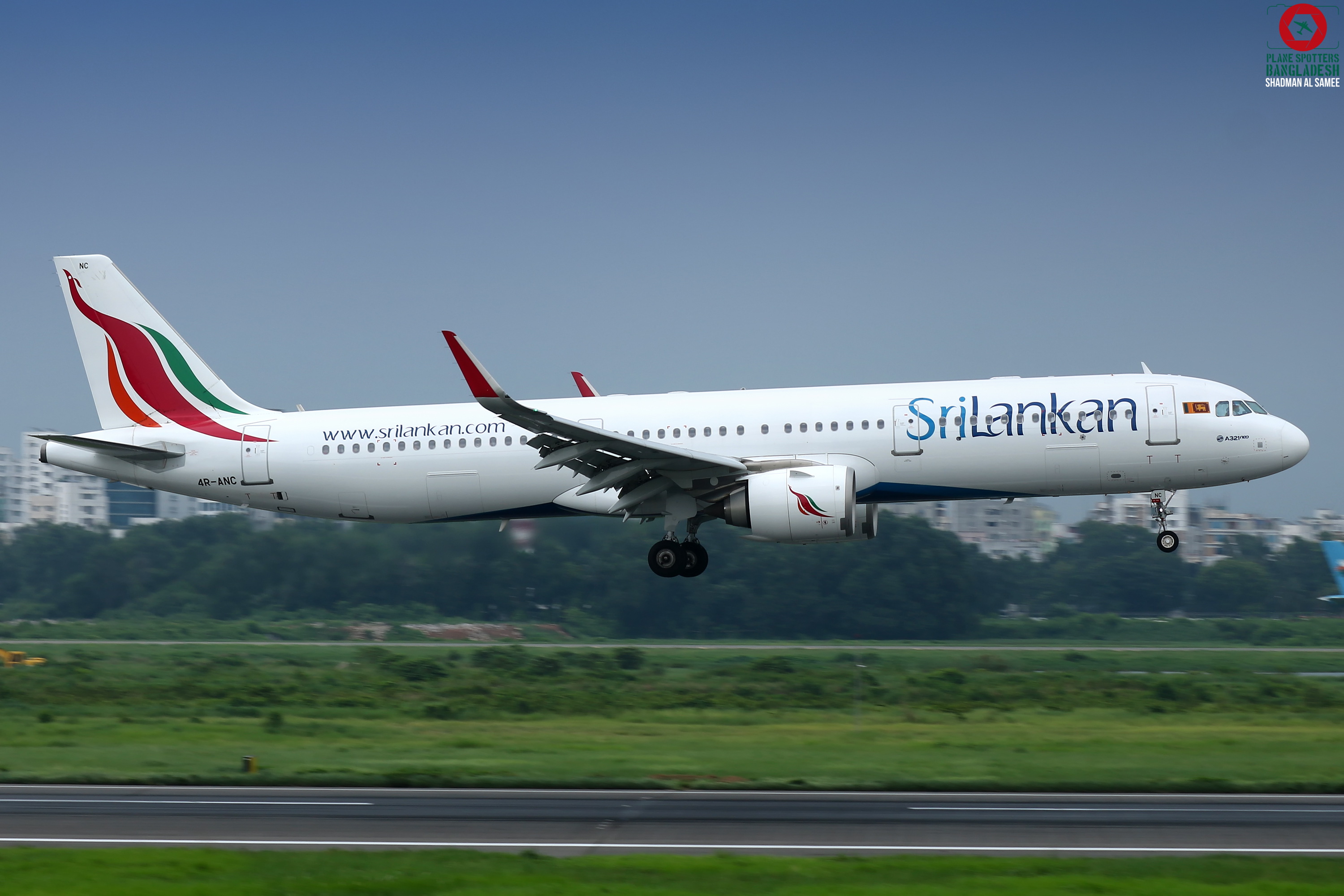 VGHS 2018: Lankan neo-Bus flaring over DAC!